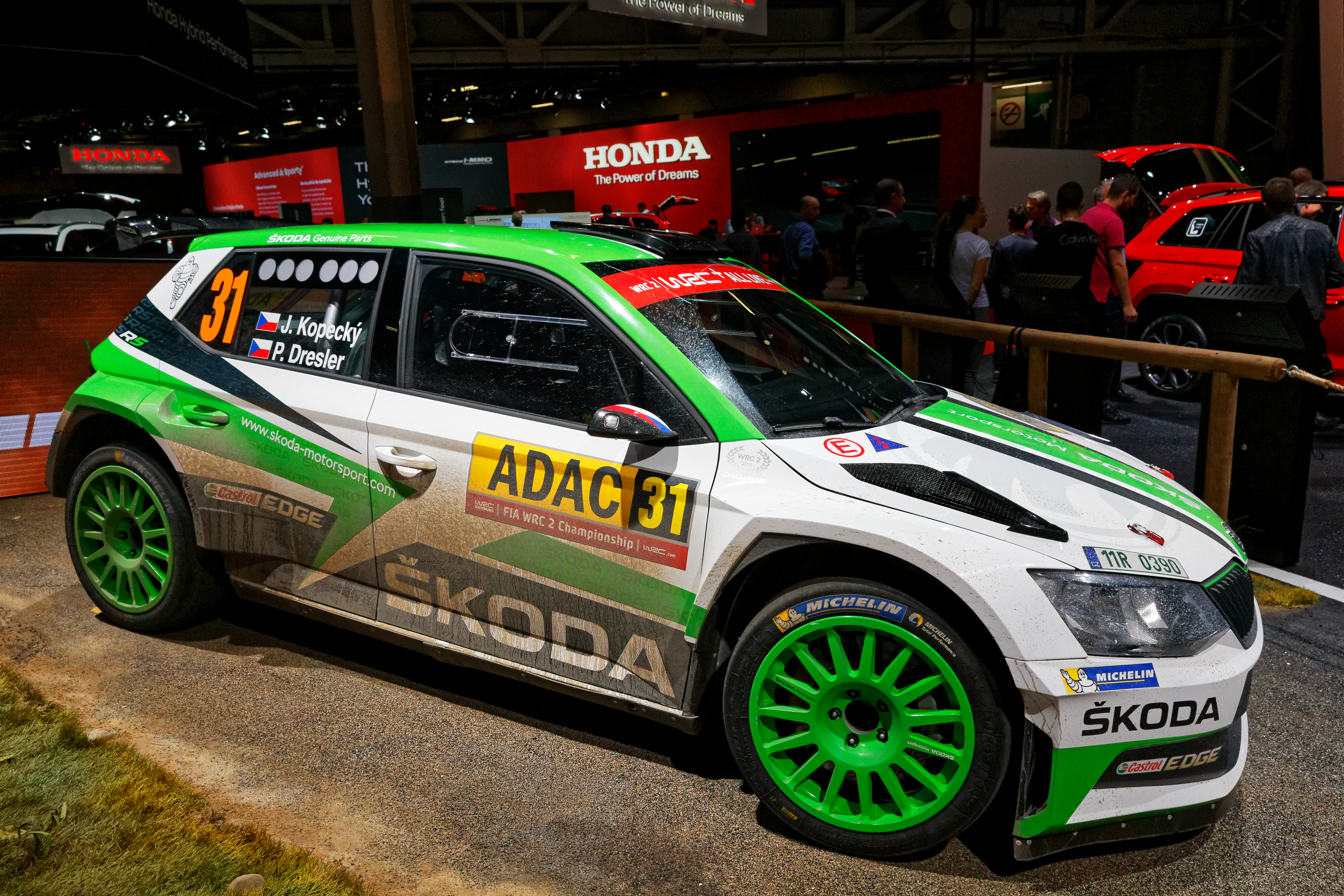 Une Škoda Fabia R5 exposée lors du mondial de l'automobile de Paris 2018.